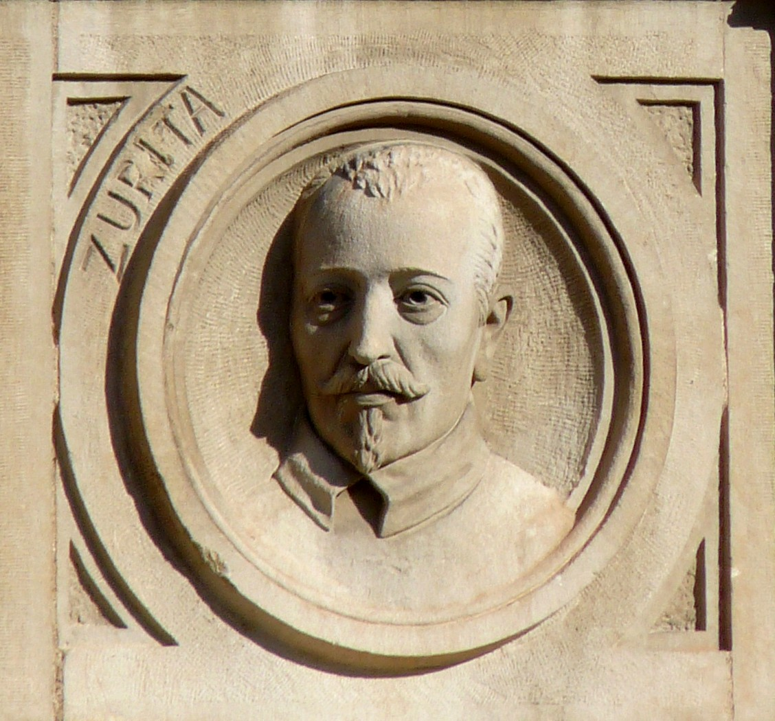 Zaragoza - Grupo escolar Gascón y Marín - Detalle de fachada: Jerónimo Zurita